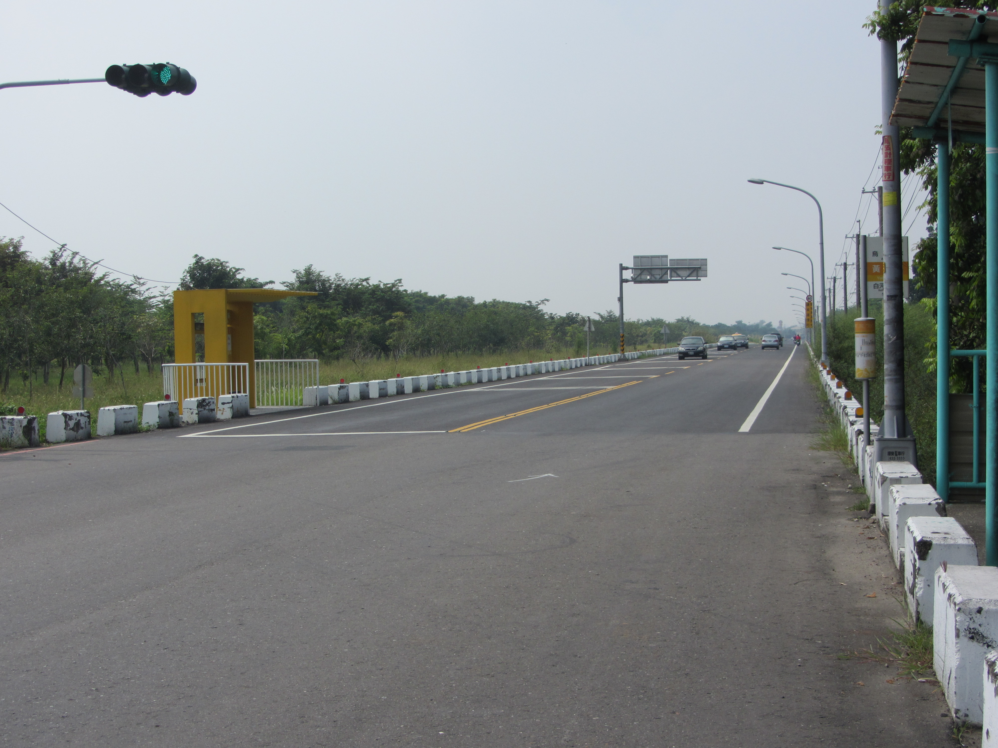 位於台南市後壁區的一段縣道172號